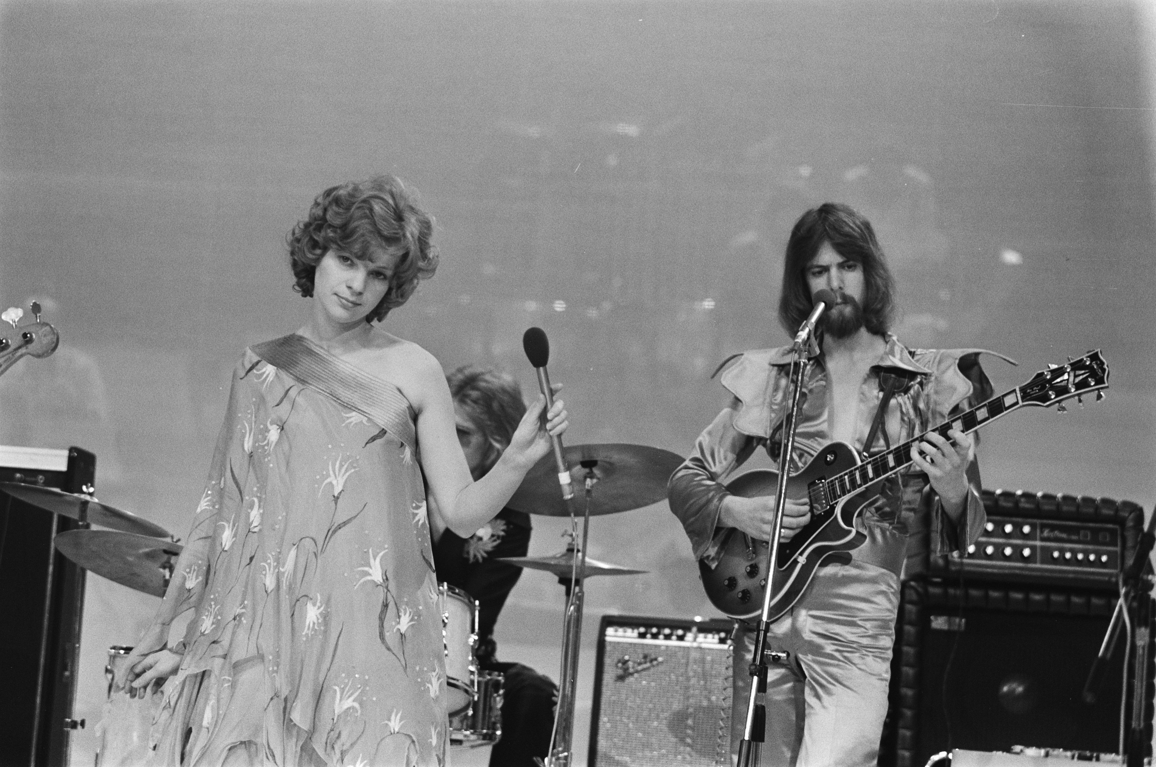 Collectie / Archief : Fotocollectie Anefo Reportage / Serie : [ onbekend ] Beschrijving : Nationaal Songfestival in Jaarbeurs Utrecht; Teach In tijdens generale repetitie Datum : 26 februari 1975 Locatie : Utrecht Trefwoorden : popgroepen, repetities Instellingsnaam : Nationaal Songfestival, Teach In Fotograaf : Bogaerts, Rob / Anefo Auteursrechthebbende : Nationaal Archief Materiaalsoort : Negatief (zwart/wit) Nummer archiefinventaris : bekijk toegang 2.24.01.05 Bestanddeelnummer : 927-7795